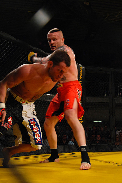 Brutal Knock Out...